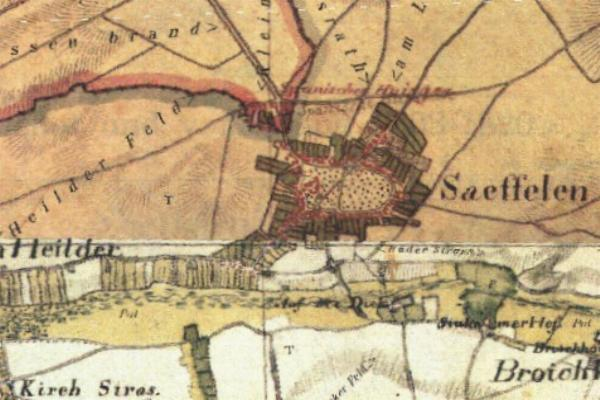 Kartenaufnahme der Rheinlande 1804/05